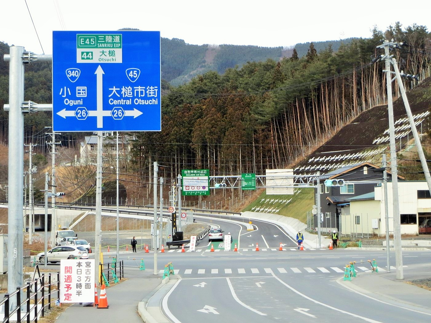 大槌インターチェンジ Canon IXY 3